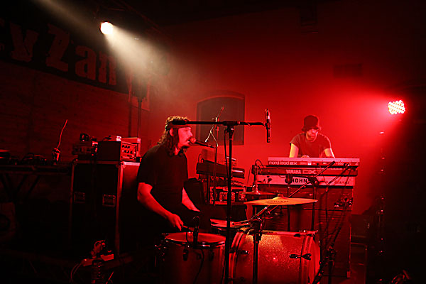 zZz